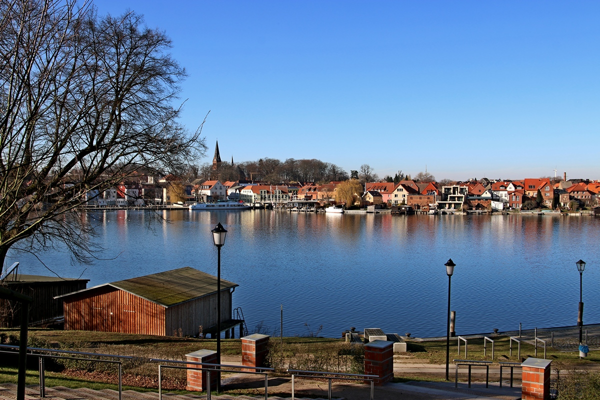 Malchower See und Malchow, Blick vom Kloster